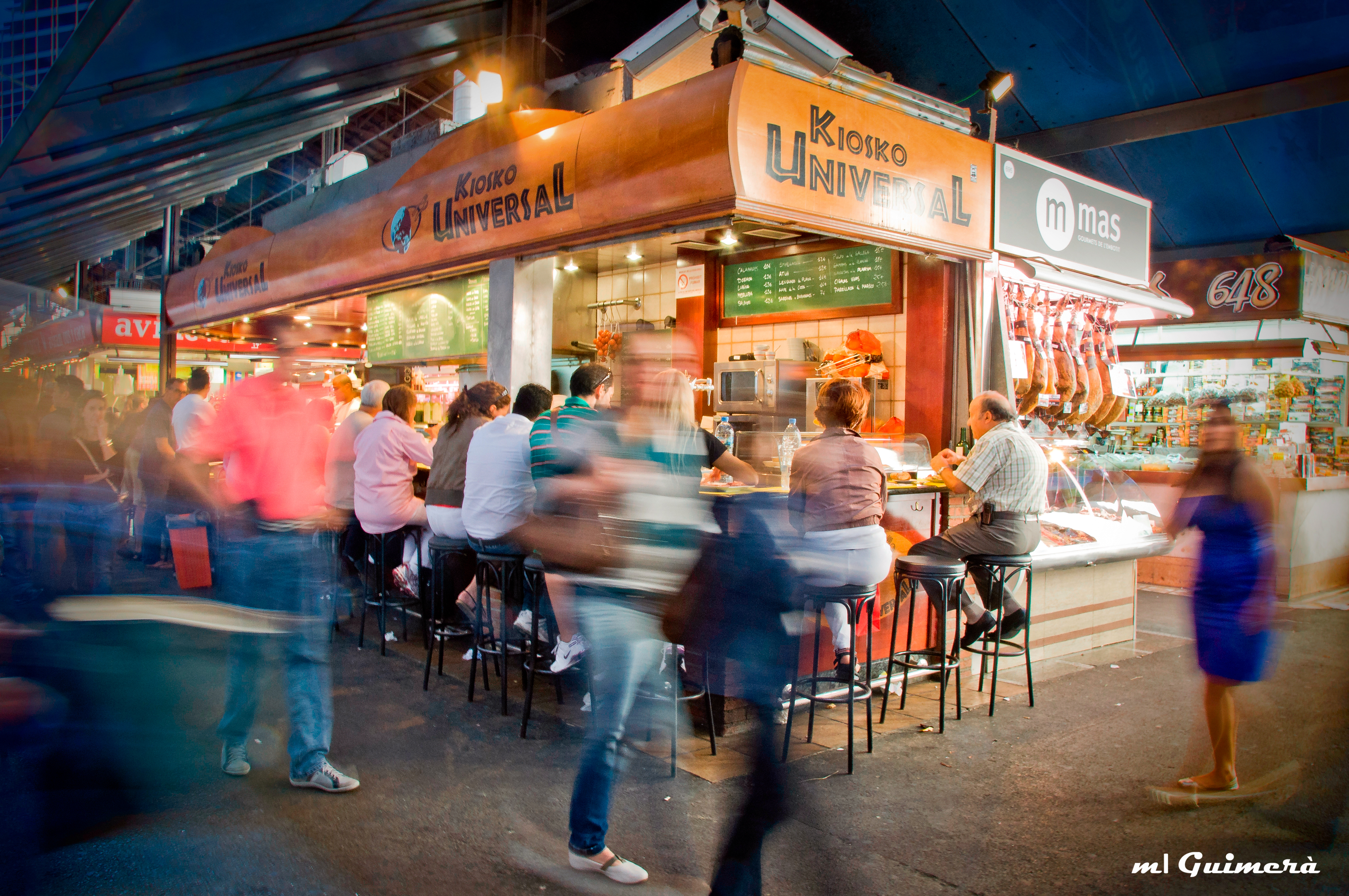 Dinar a la Boqueria